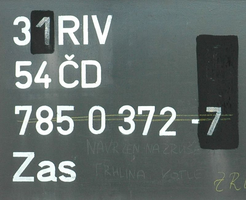 Číselné označení železničního nákladního vozu